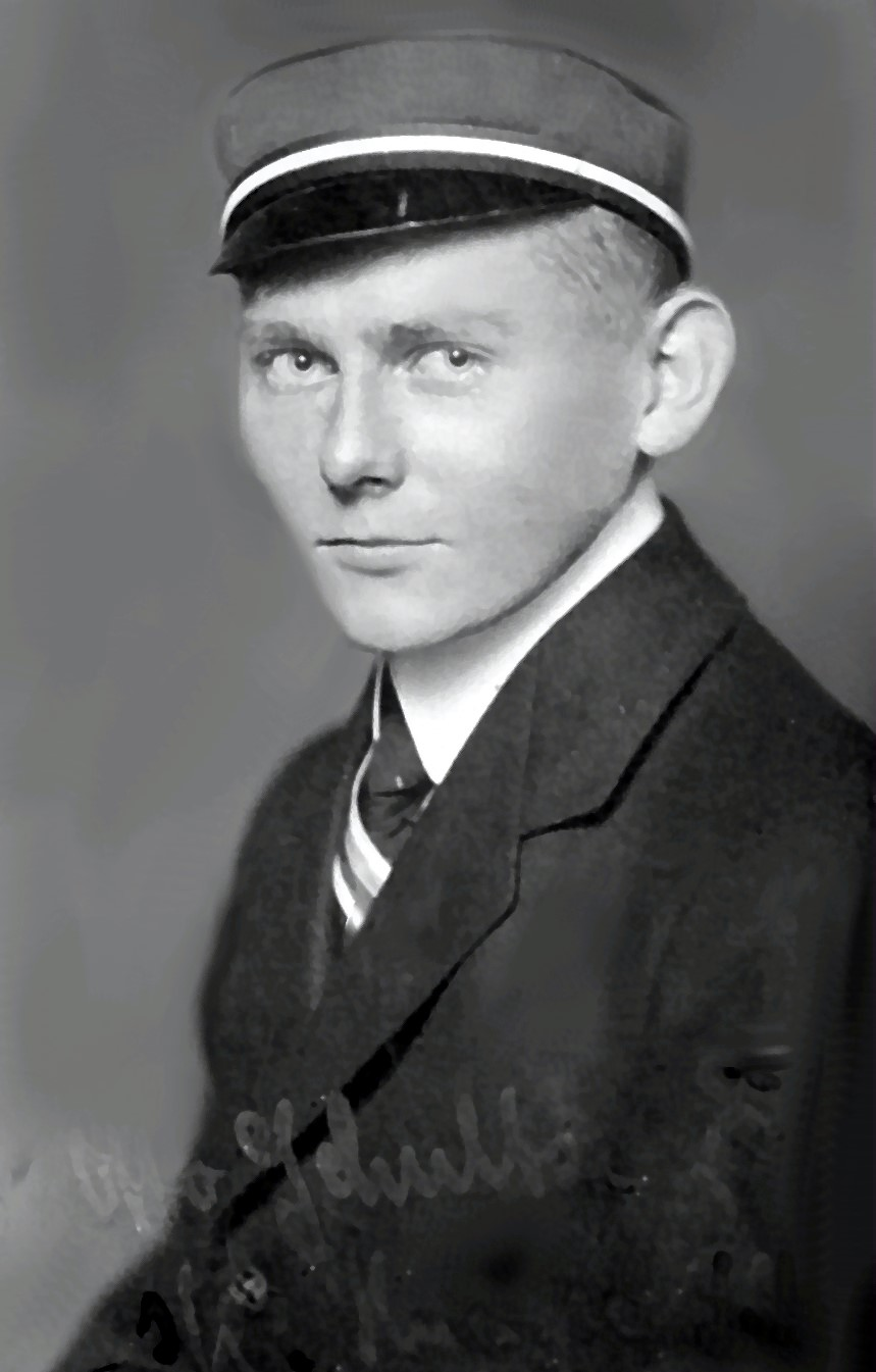 Porträtfotographie von Otto Schultze-Rhonhof